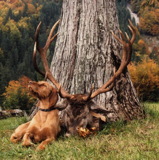 Magyar Vizsla Drahthaar